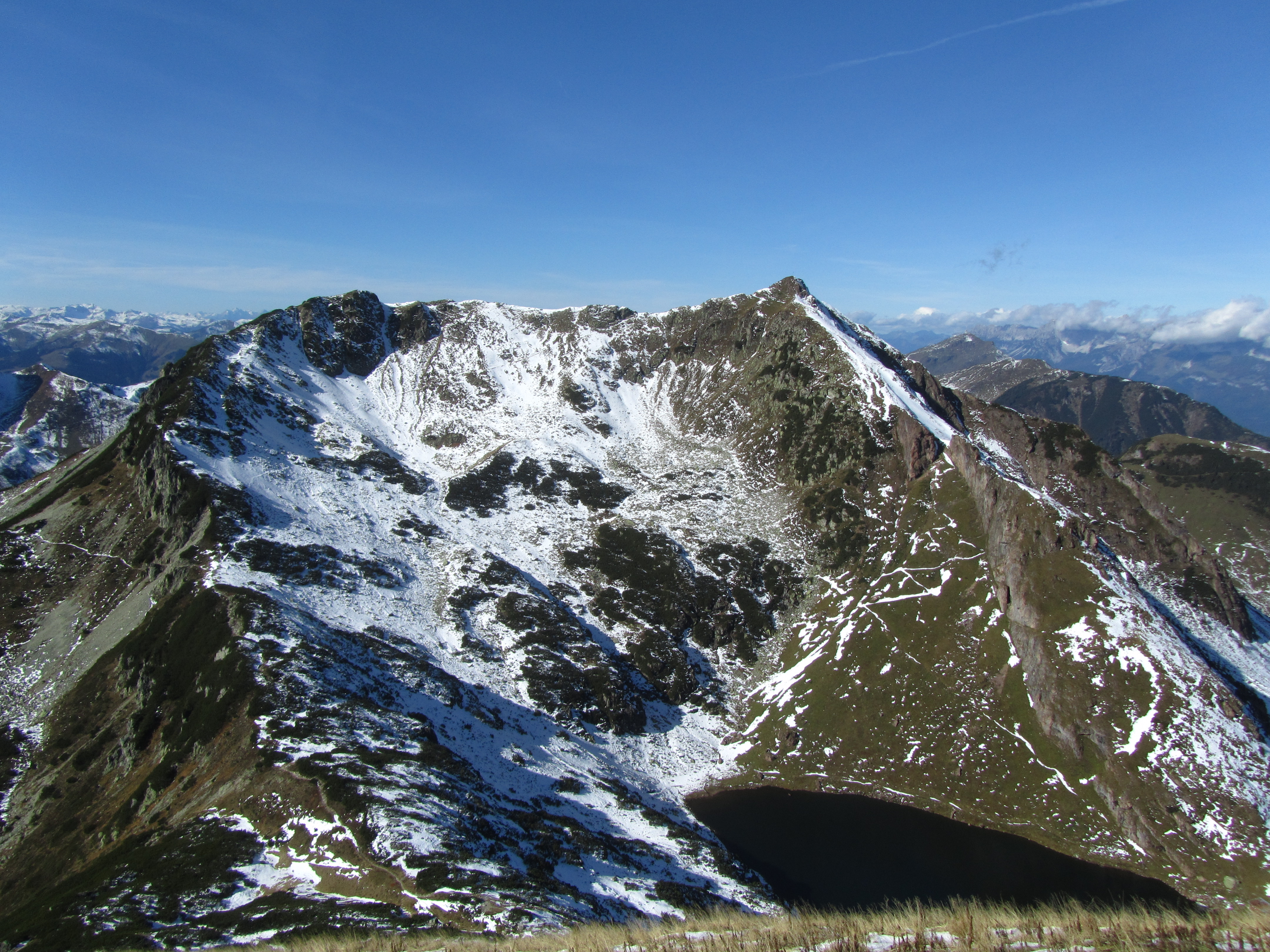 Der Wildseeloder in den Kitzbüheler Alpen von Osten, aufgenommen von der Henne. Unten der Wildsee